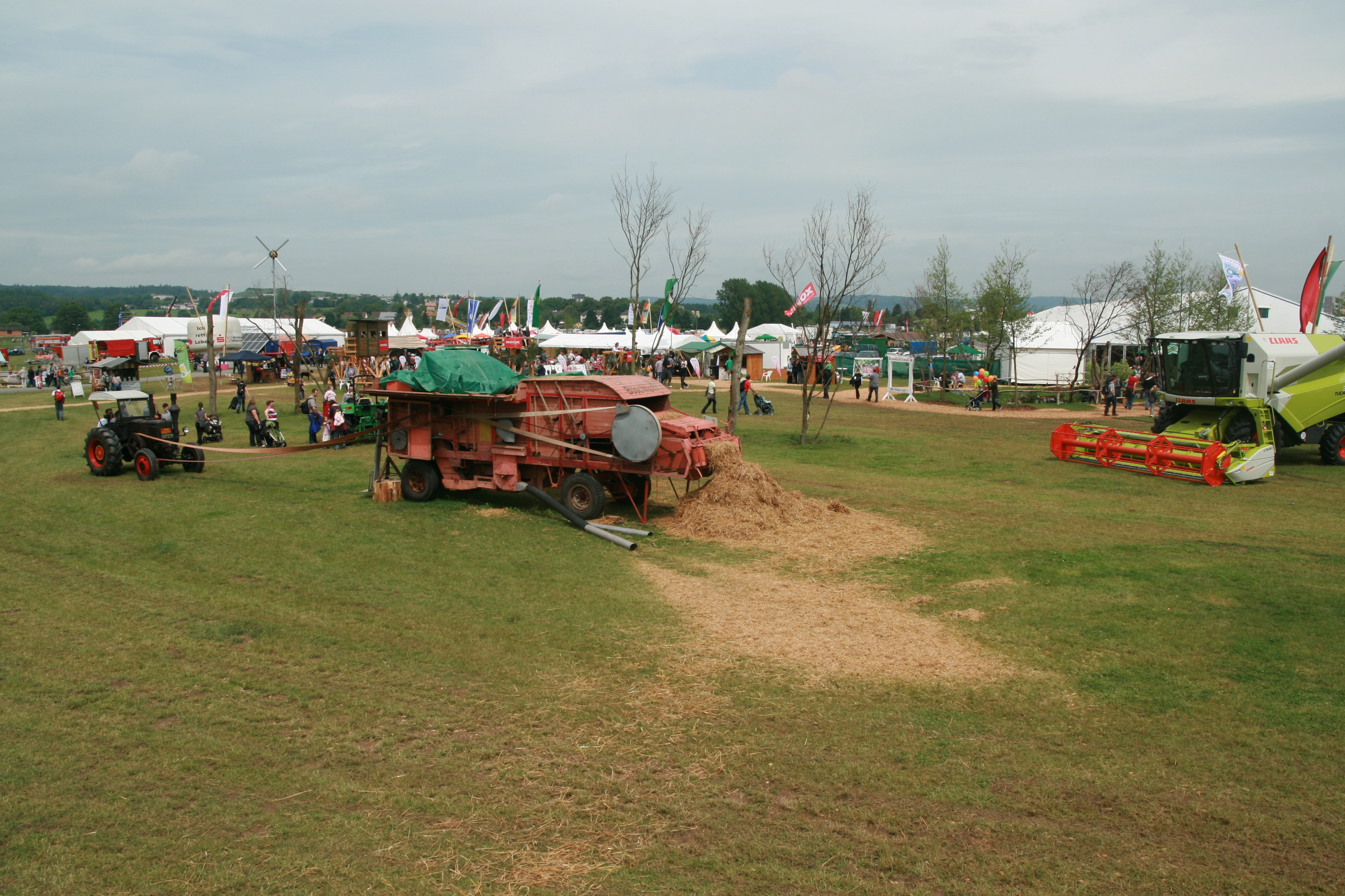 Ausstellung "Der Natur auf der Spur" auf dem Hessentag 1.-10. Juni 2012 im Wetzlarer Bodenfeld